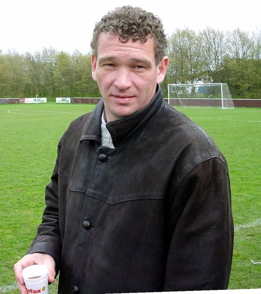 John "Faxe" Jensen at Herfølge Stadium